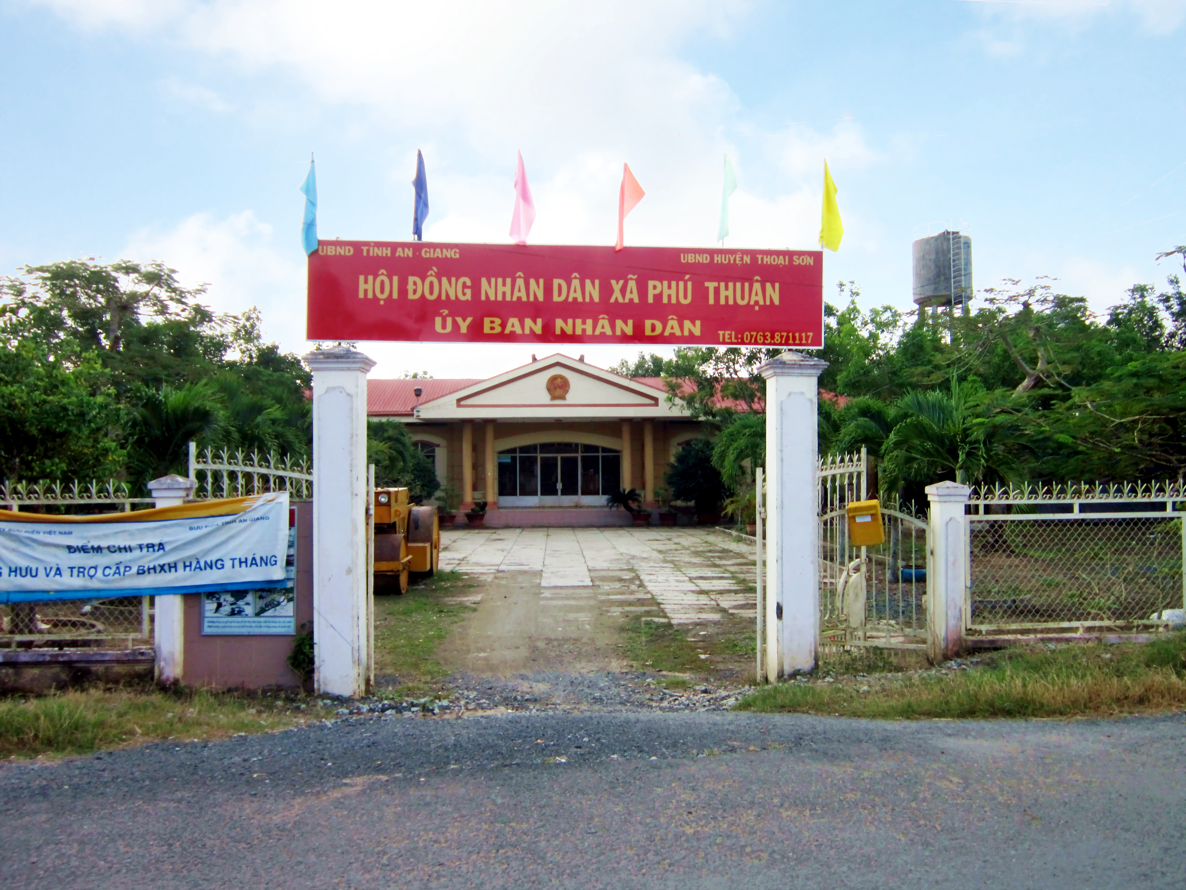 Ủy ban Nhân dân xã Phú Thuận, thuộc huyện Thoại Sơn, An Giang, Việt Nam.